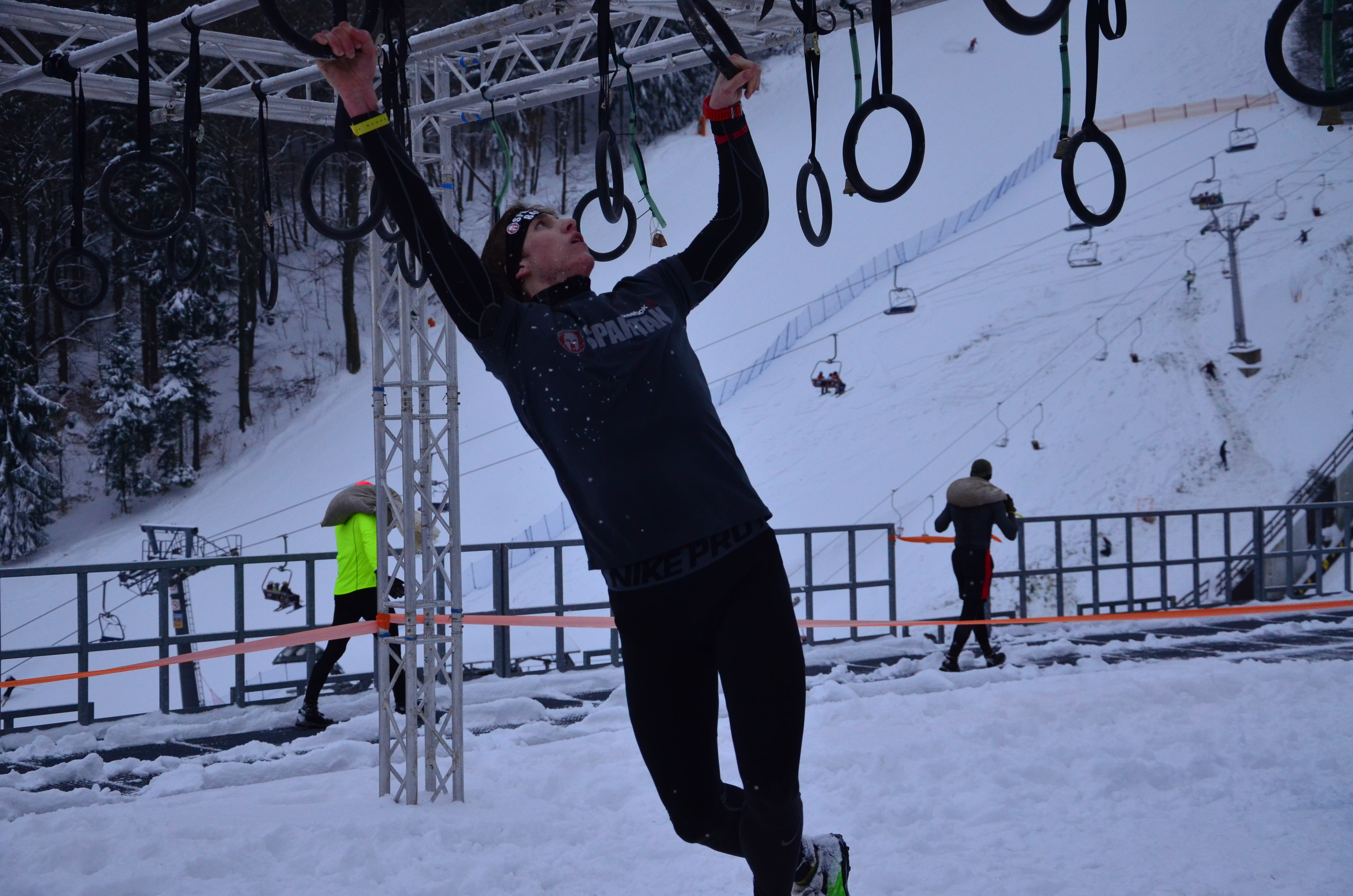 prek2